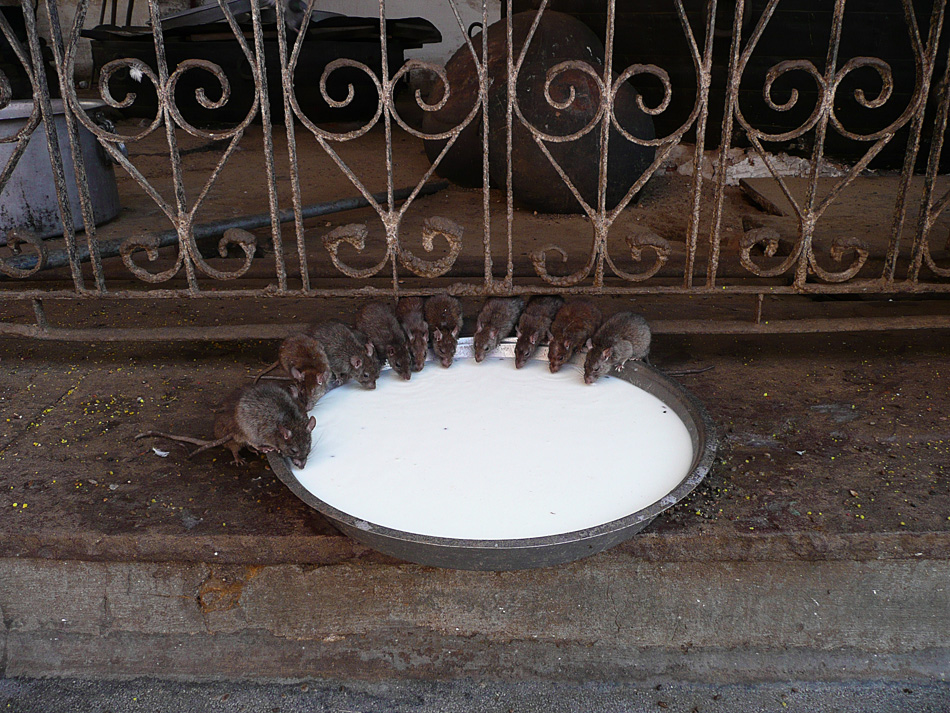 Karni Mata Mandir in Deshnoke, Rajasthan, India